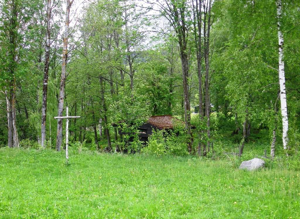 Bagns gamle kirkested. Her skal Ulekirken ha stått.